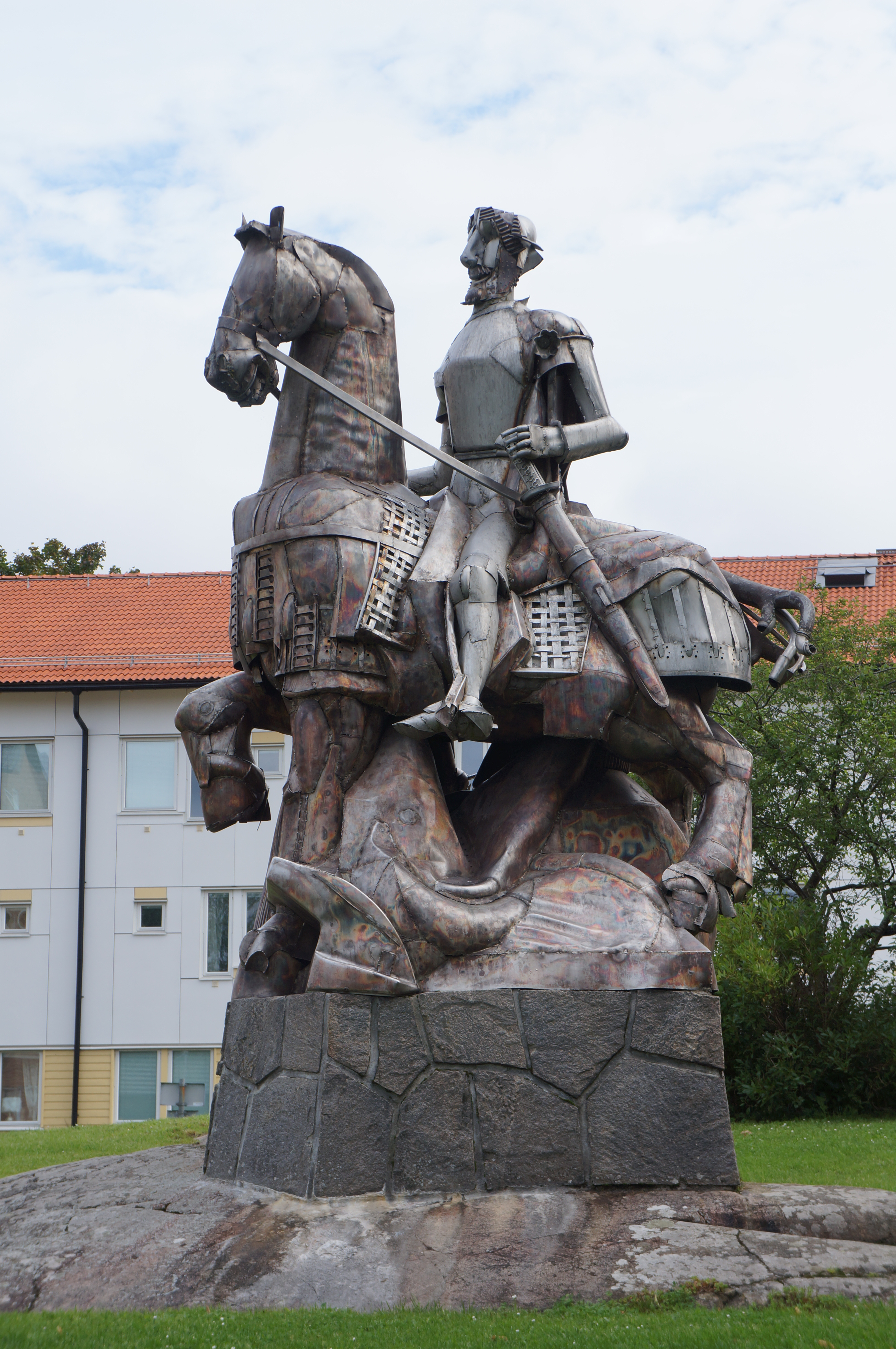 Rostfri ryttarstaty föreställande Olof den helige skapad av Allan Ebeling. Placerad i studentbostadskvarteret Triangeln, Uppsala.